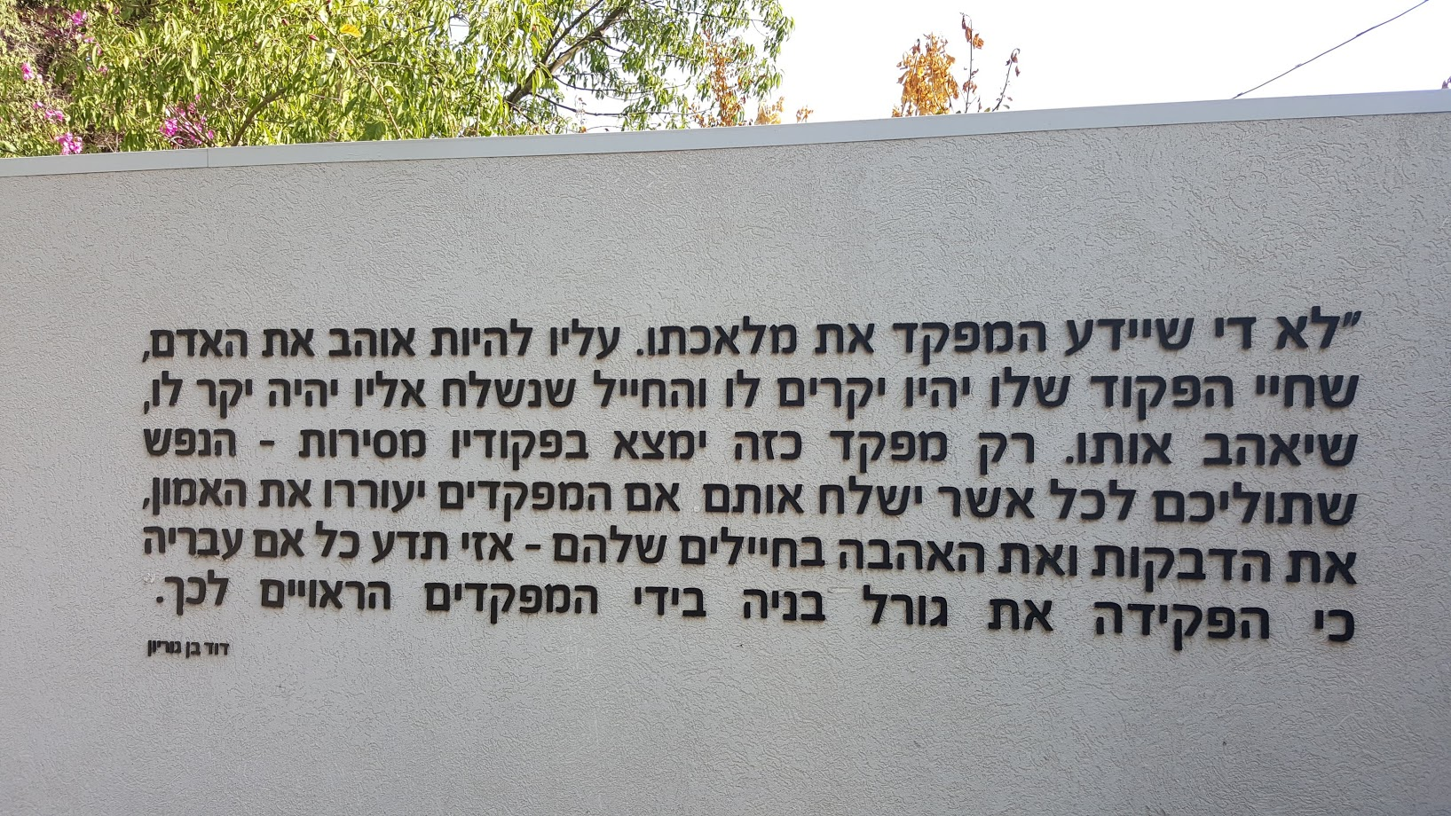 הציטוט המלא של "תדע כל אם עבריה" על קיר בכניסה לבסיס קליטה ומיון של צה"ל